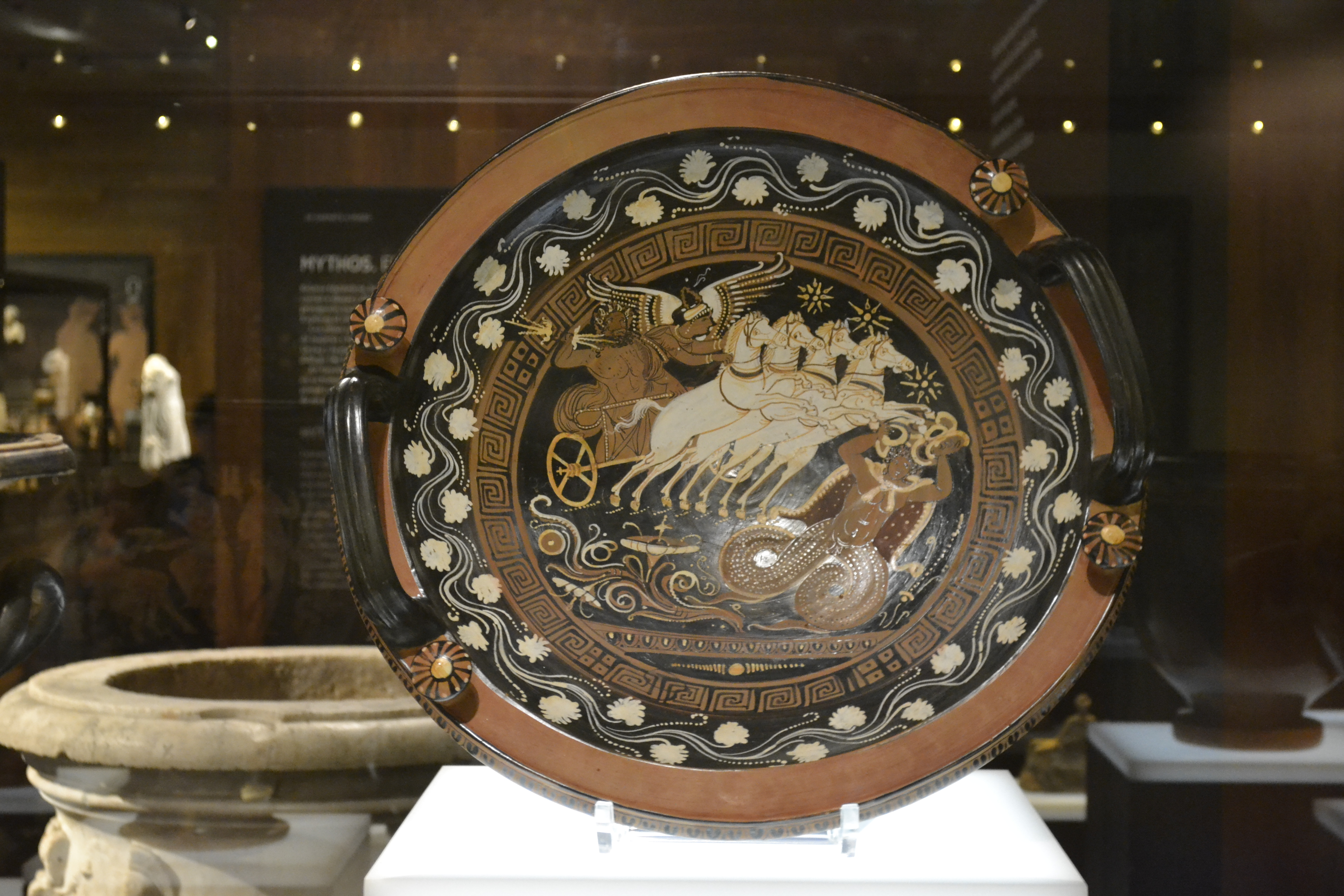 Lecane de Zeus venciendo a los gigantes. Grupo de Stuttgart. Altura: 16,20 cm; diámetro máximo: 57 cm; diámetro base: 12 cm. Apulia, 360-340 a. C. Nº Inv. 2008/171/3. Museo Arqueológico Nacional de España.